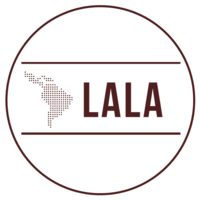 Logo do LALA